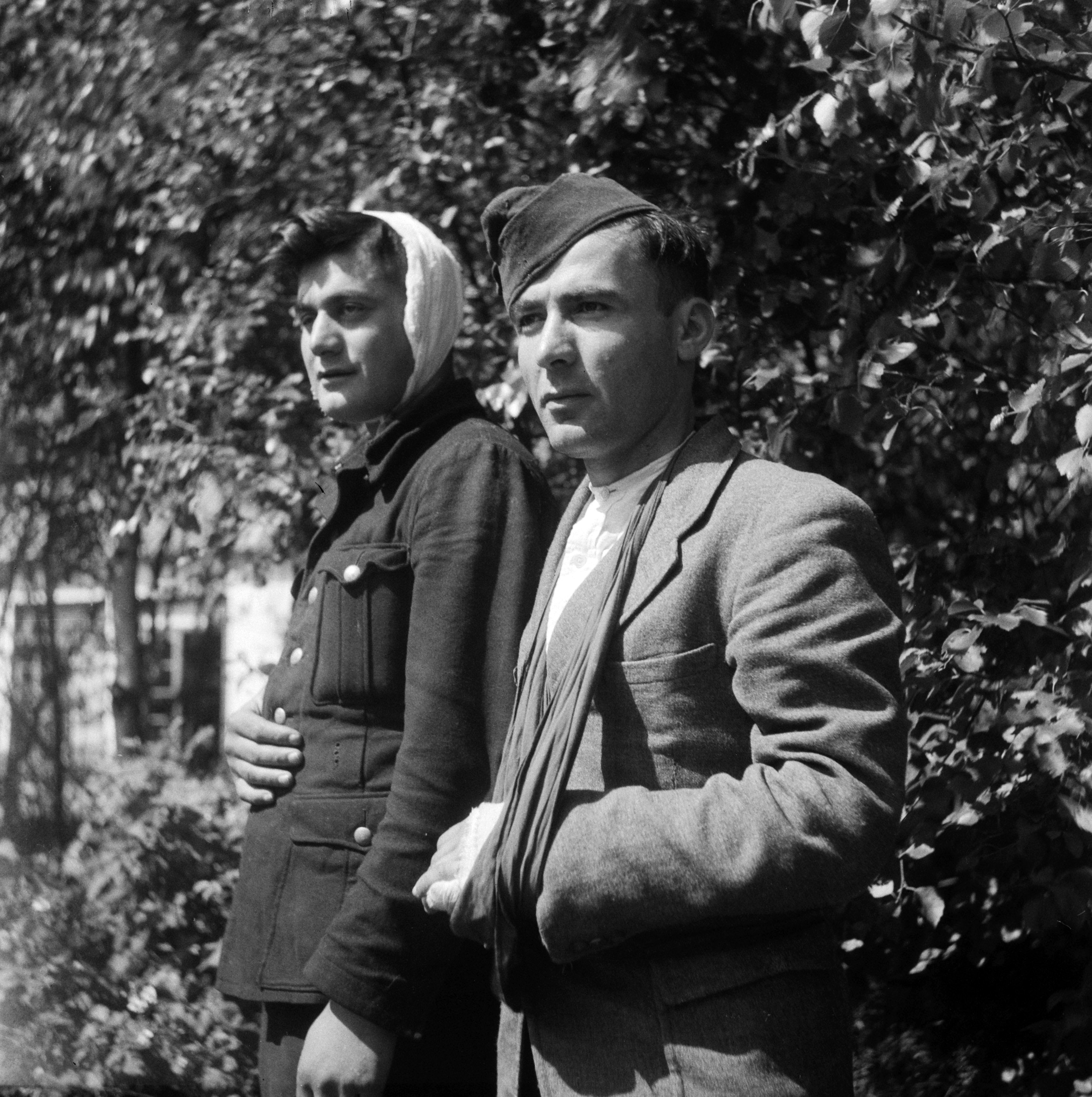 Georgische soldaten op Texel.